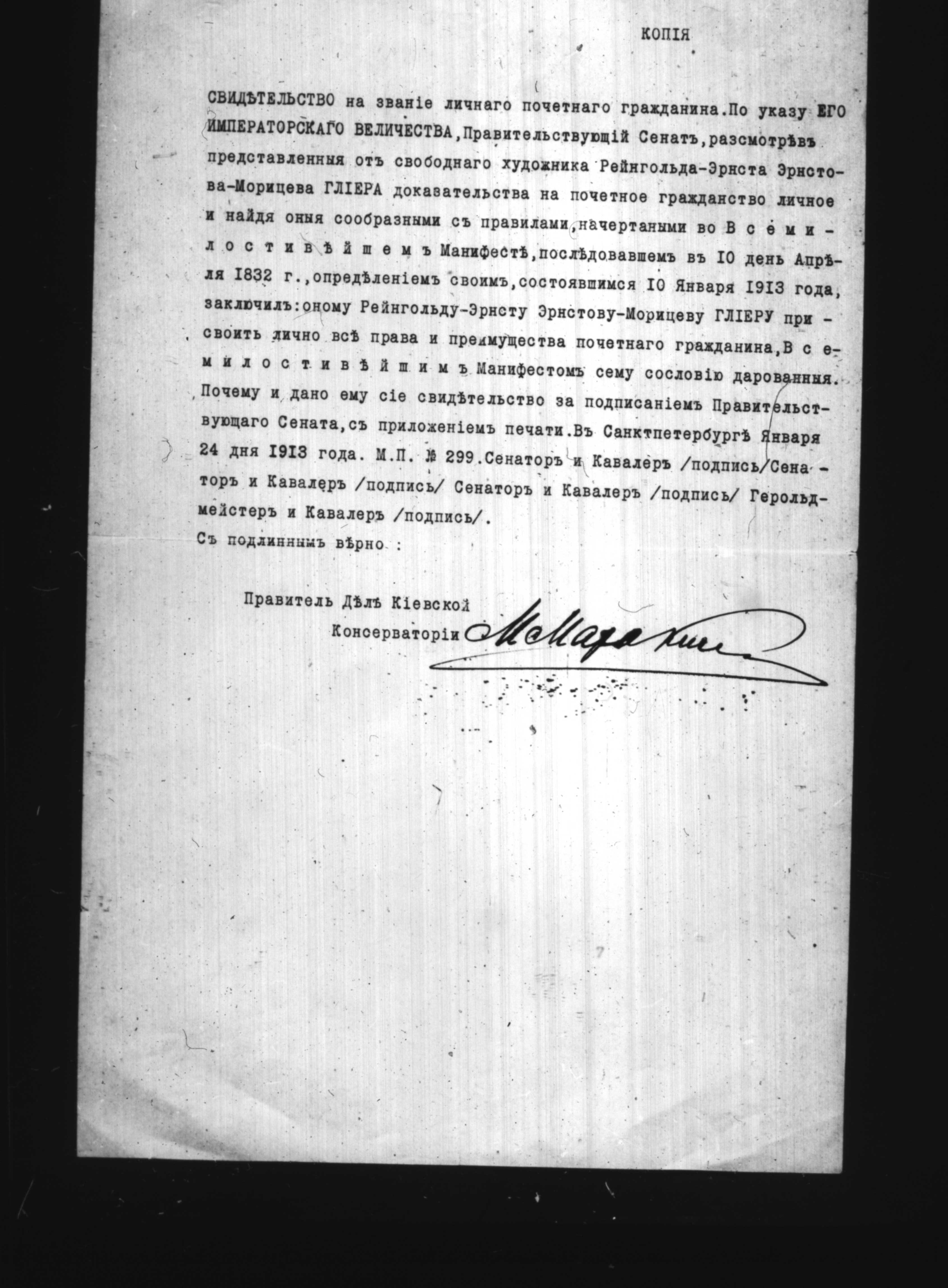 Машинописная расшифровка Свидетельства на звания личного почётного гражданина, просвоенного Сенатом Р. М. Глиэру 10 января (ст.ст.) 1913 года